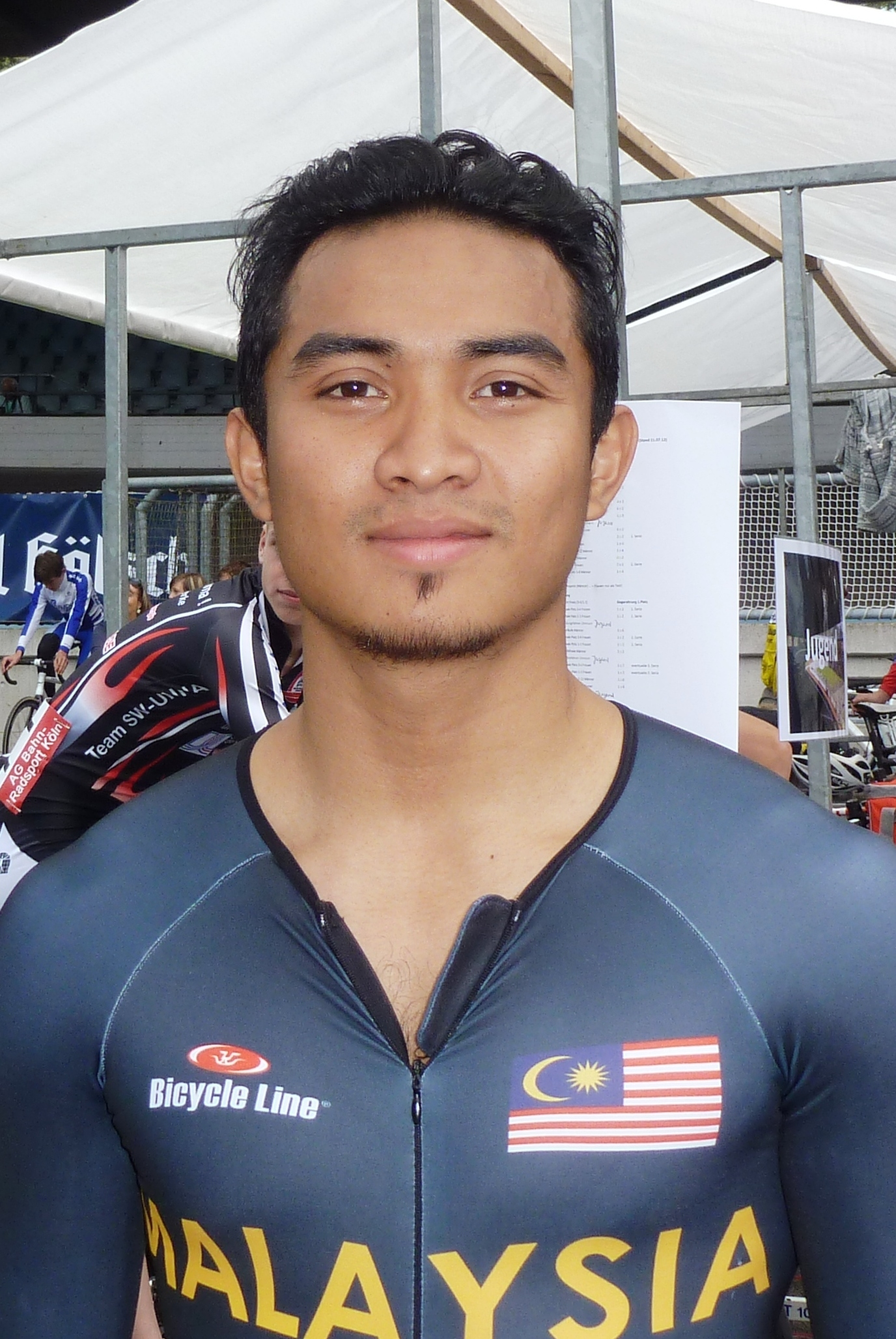 Azizulhasni Awang, malaysischer Radsportler